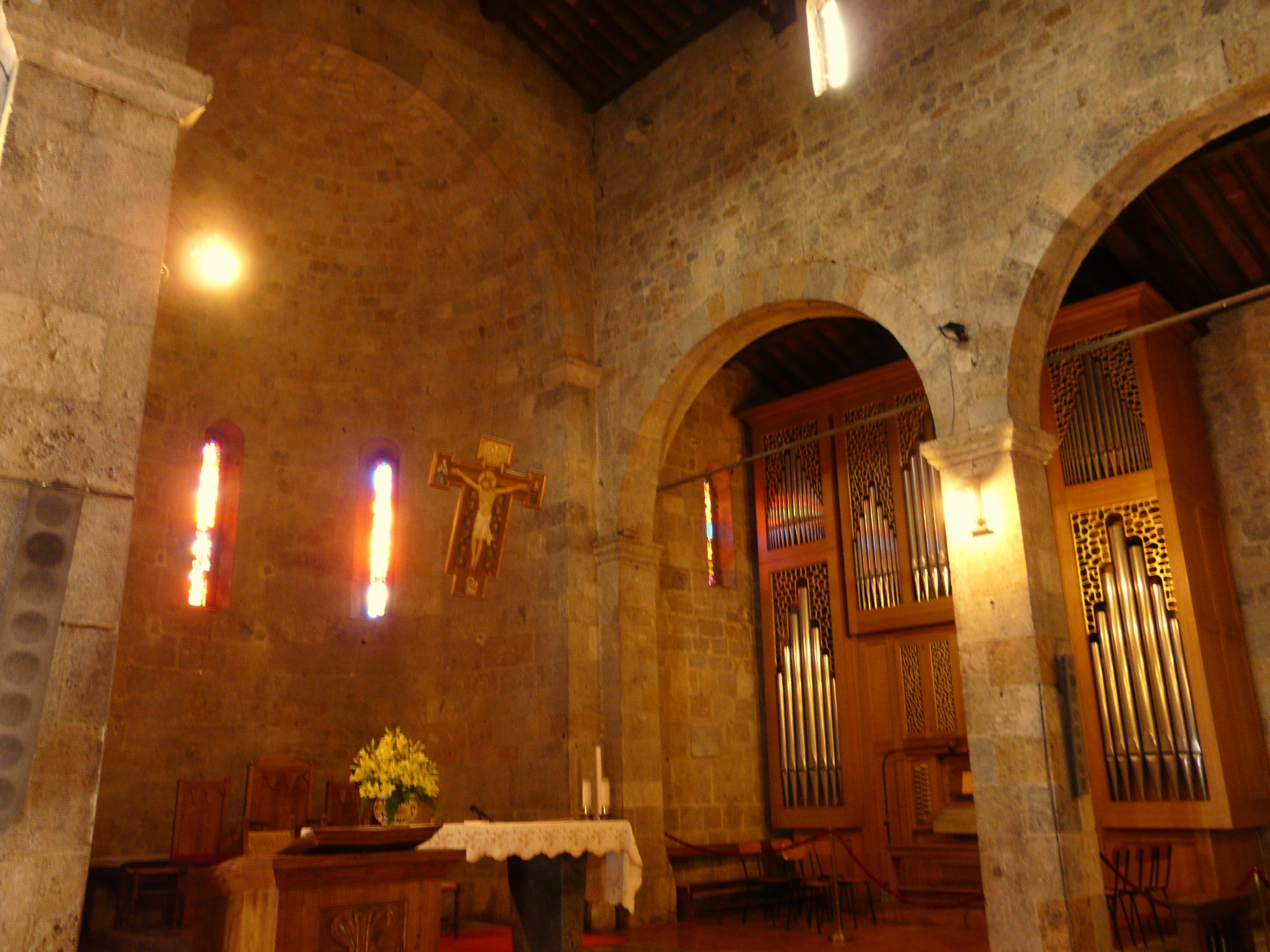 Altare maggiore della badia di San Pietro, Camaiore, Toscana, Italia